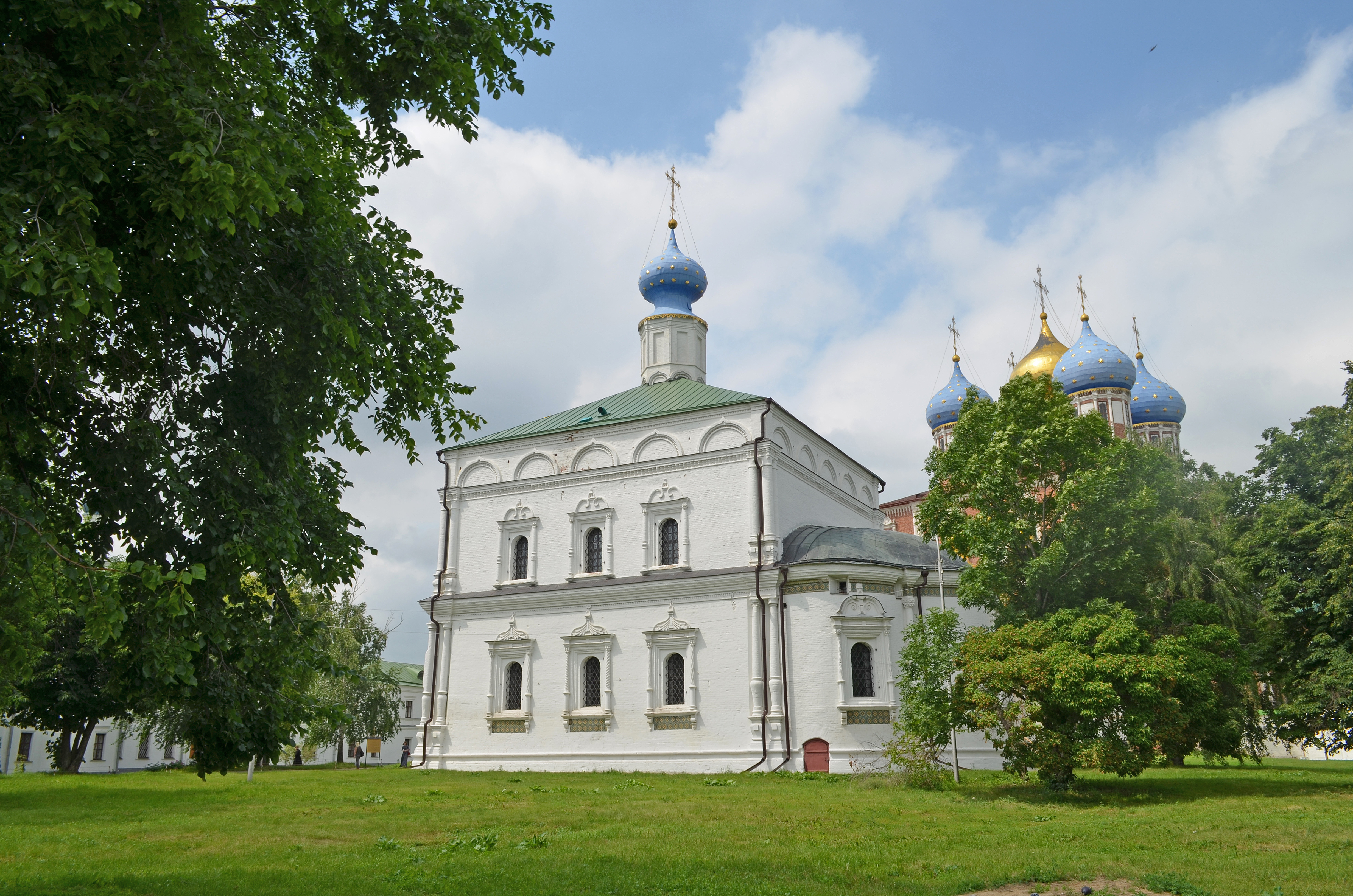 Рязань.Спасо-Преображенский собор,1702 год.